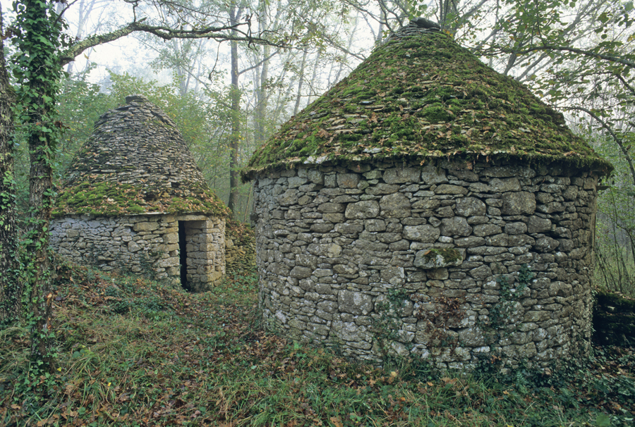 Deux cabanes en pierre sèche se faisant face au lieudit Coudounier, commune de Badefols-sur-Dordogne, Dordogne, France. .